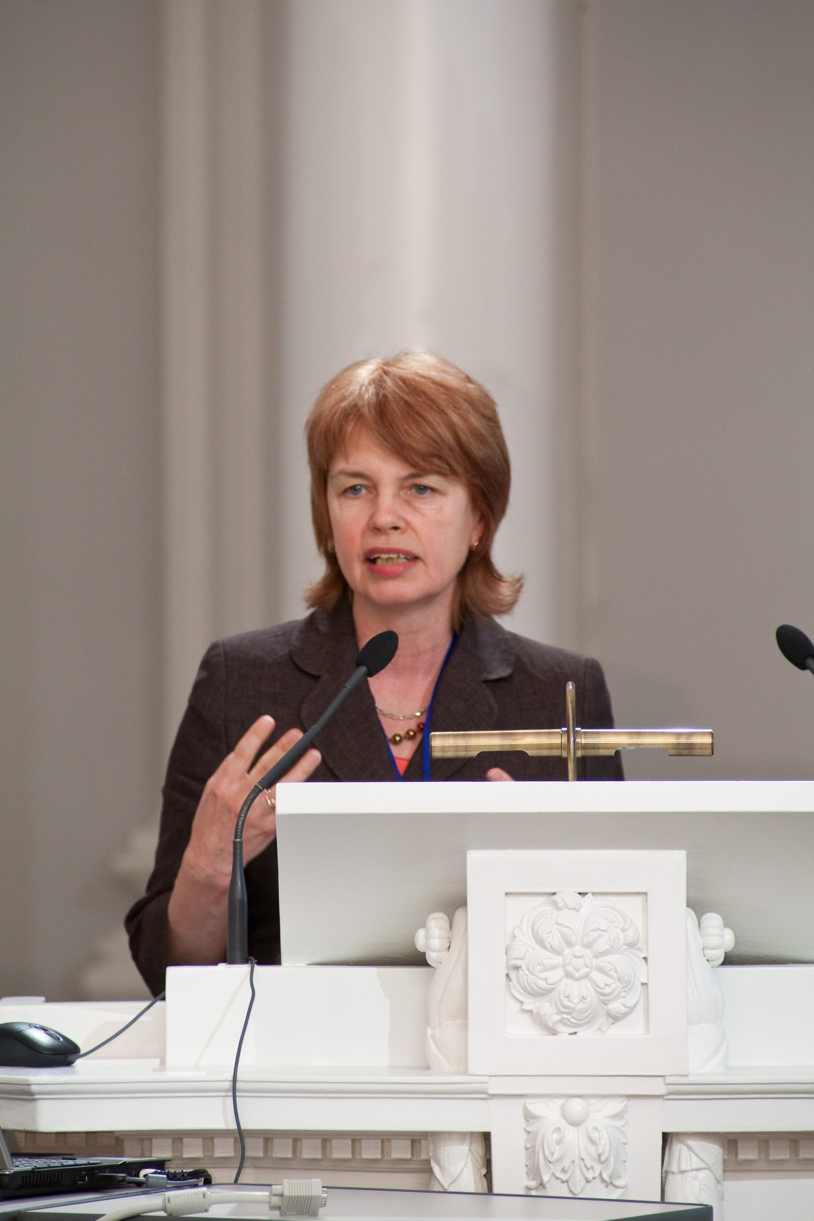 Tartu Ülikooli meditsiinilise mikrobioloogia ja viroloogia professor Irja Lutsar Tartus X Balti Lasteneuroloogide Ühingu konverentsil 2009. aastal.